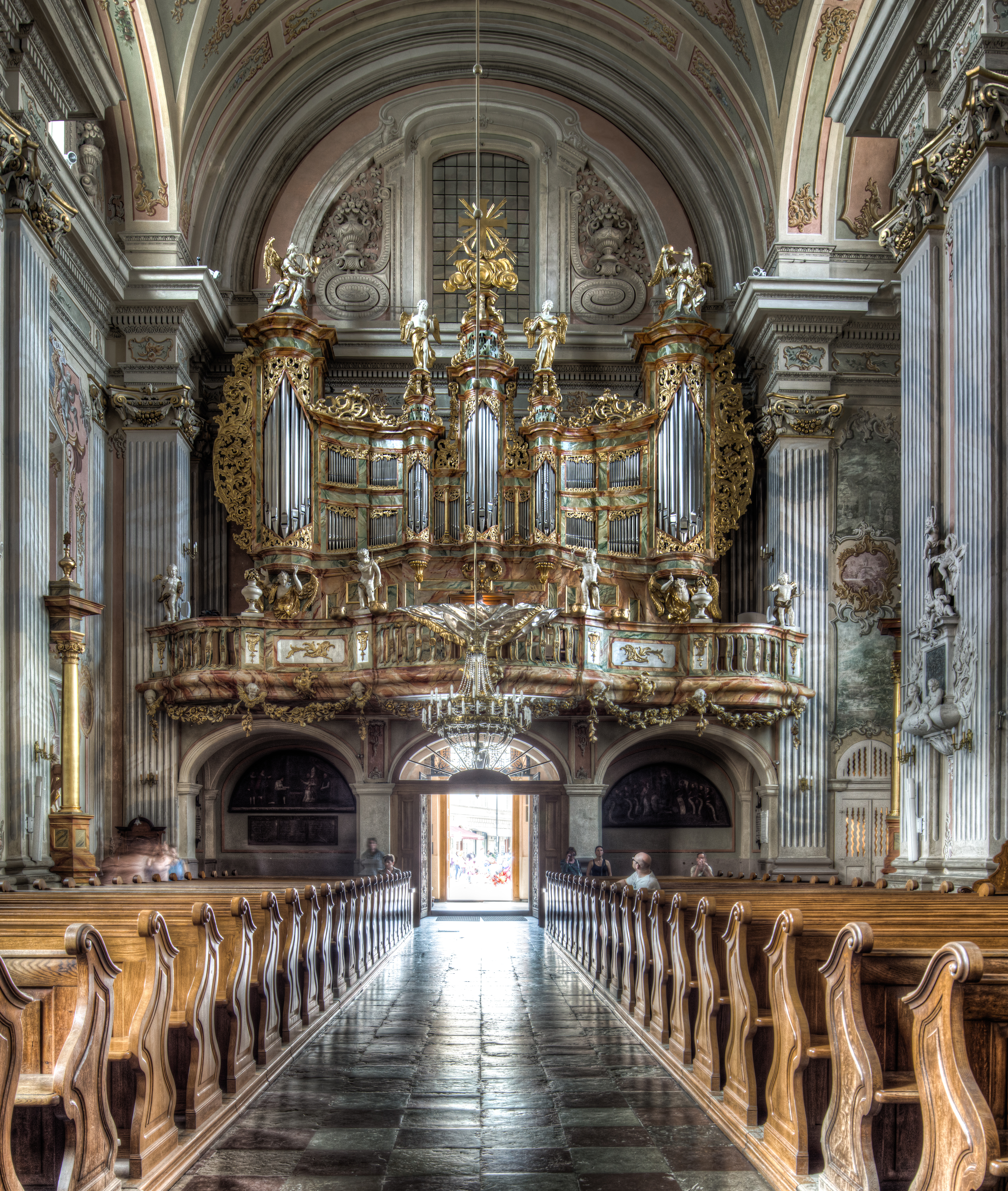 Chór w kościele św. Anny w Warszawie. Zdjęcie wykonane obiektywem Samyang Tilt Shift 24mm f/3.5. This photo was taken with Sony SLT-A77 camera, thanks to cooperation with Sony Poland. You can see all photographs in category Taken with Sony SLT-A77. English | polski | +/−